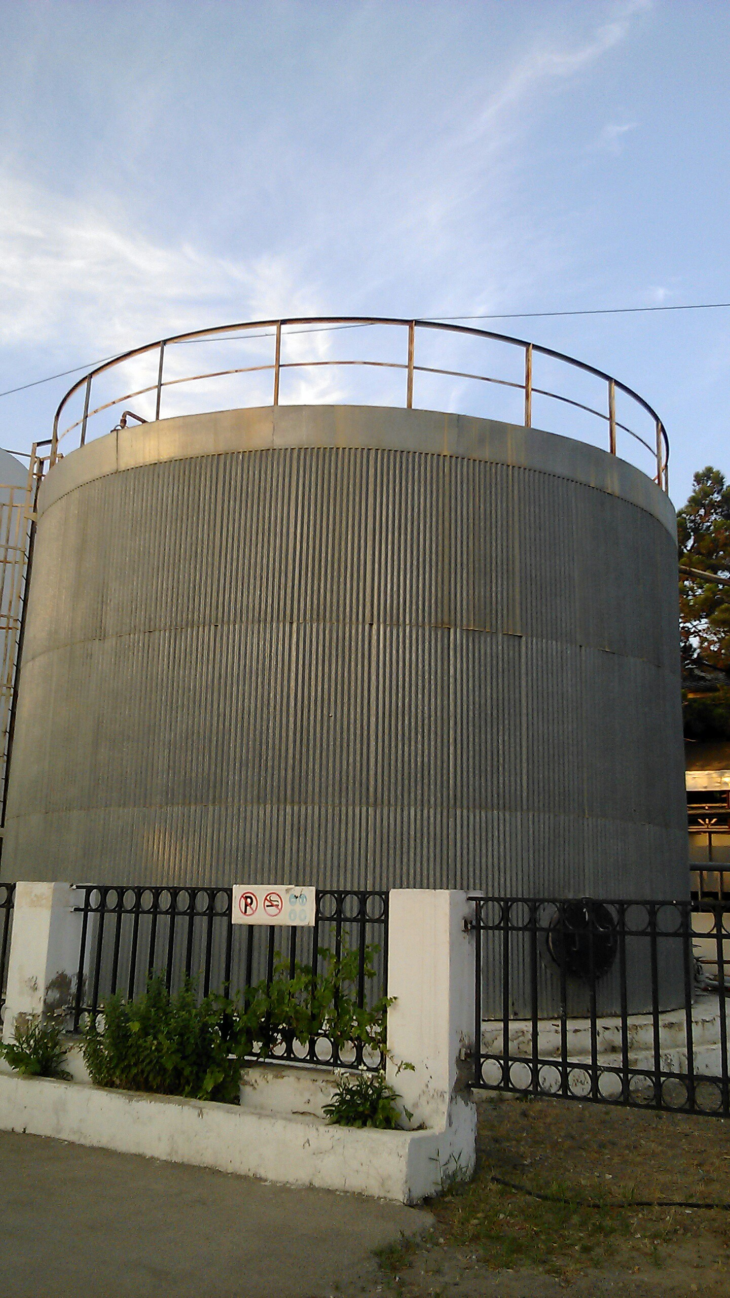 Qalıq anbarı - neft və neft məhsulları qalıqlarının toplanıb saxlanılması üçün istifadə edilən 400 tonluq çən.